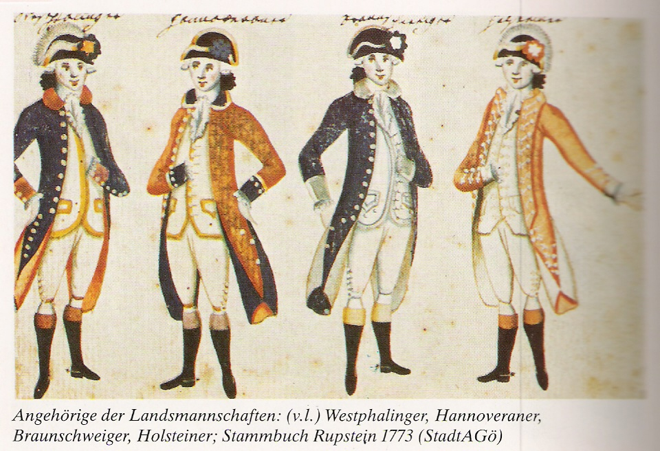 Stammbuchblatt aus dem Stammbuch Rupstein von 1773 mit Studenten in den Uniformen der Couleur ihrer Landsmanschaften der von links Westphalen, Hannoveraner, Braunschweiger und Holsteiner, wie sie an der Universität Göttingen getragen wurden.